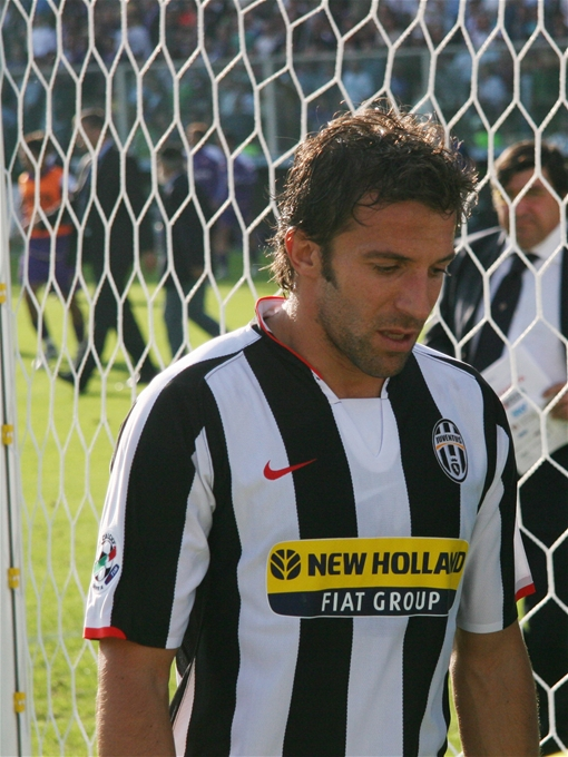 Alessandro Del Piero